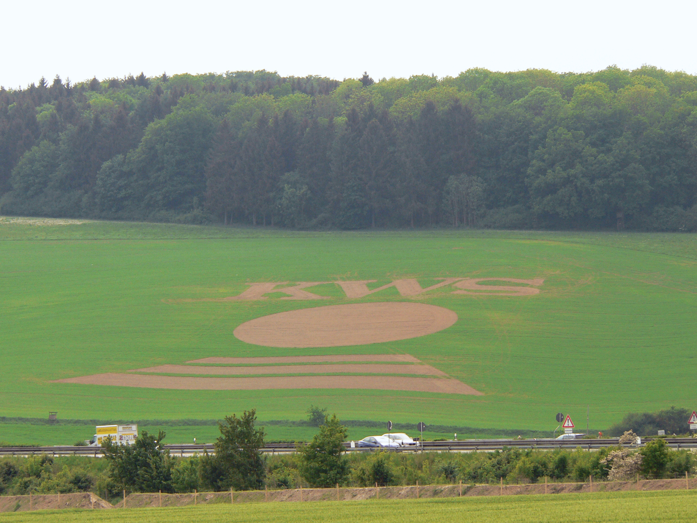 Edesheimer Wald mit KWS Logo